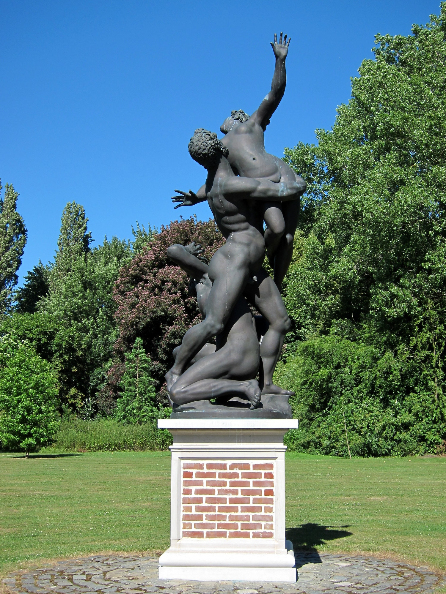 L'enlèvement des Sabines de Jean de Bologne dans le parc du château du Vert Bois à Bondues (Nord).